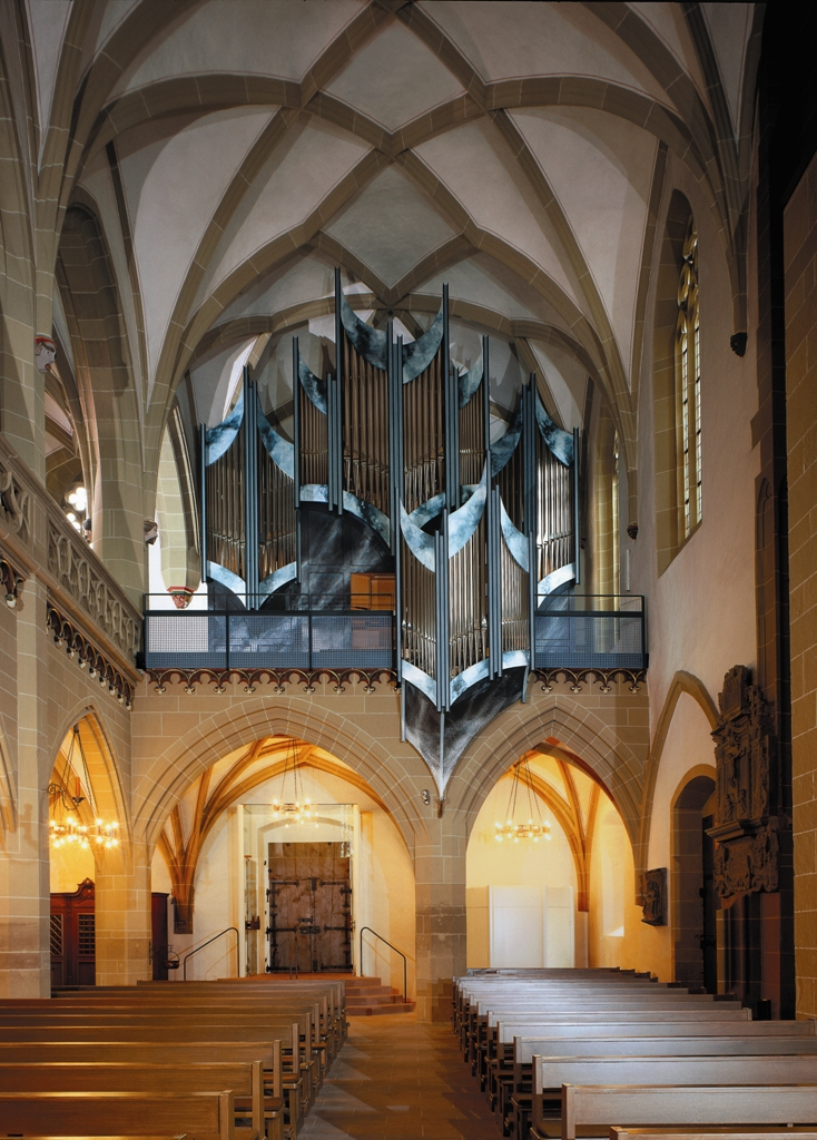 Ansicht der Vleugels-Orgel in der Pfarrkirche St. Johannes in Kitzingen